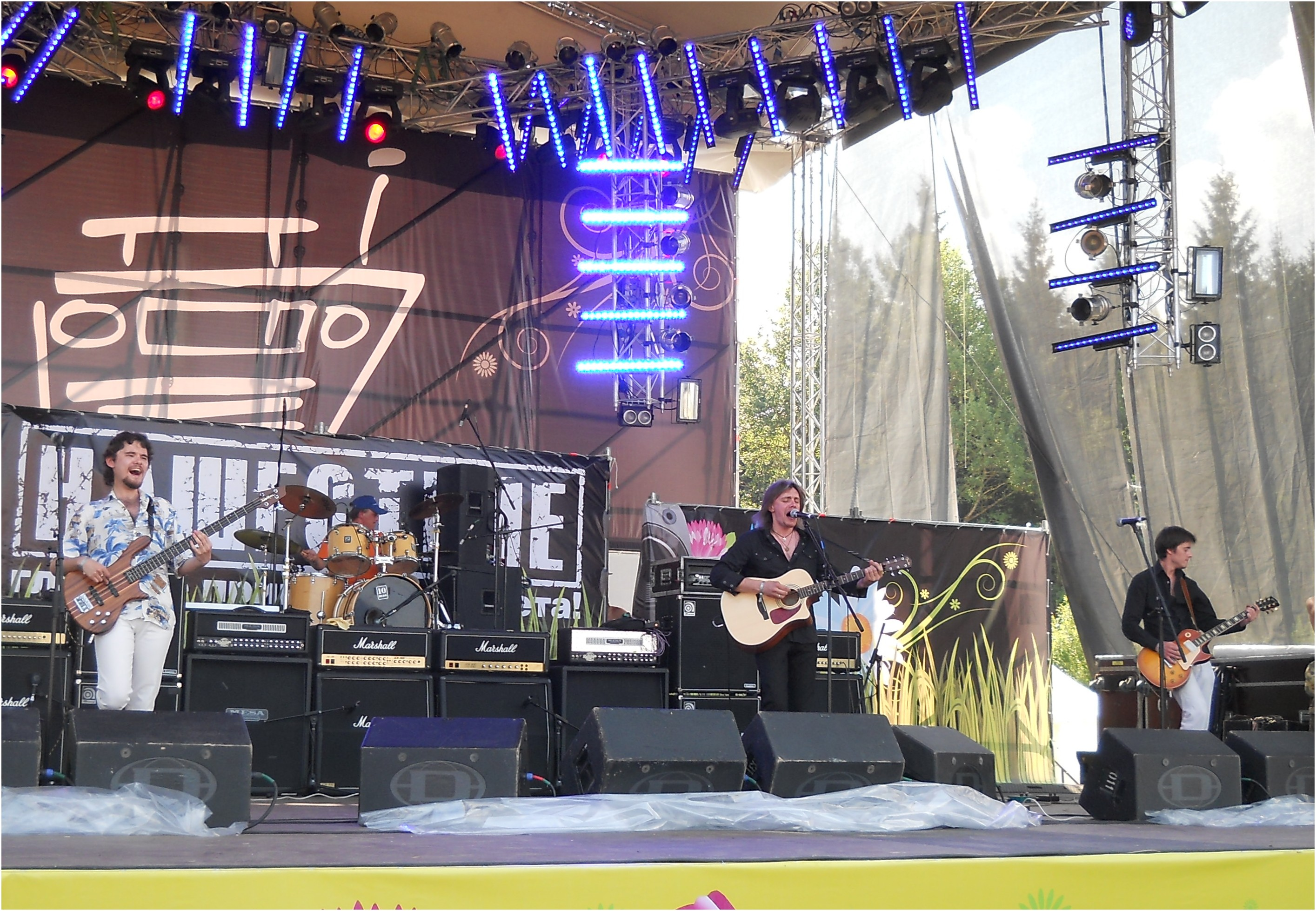 Группа Река на фестивале Нашествие 2010